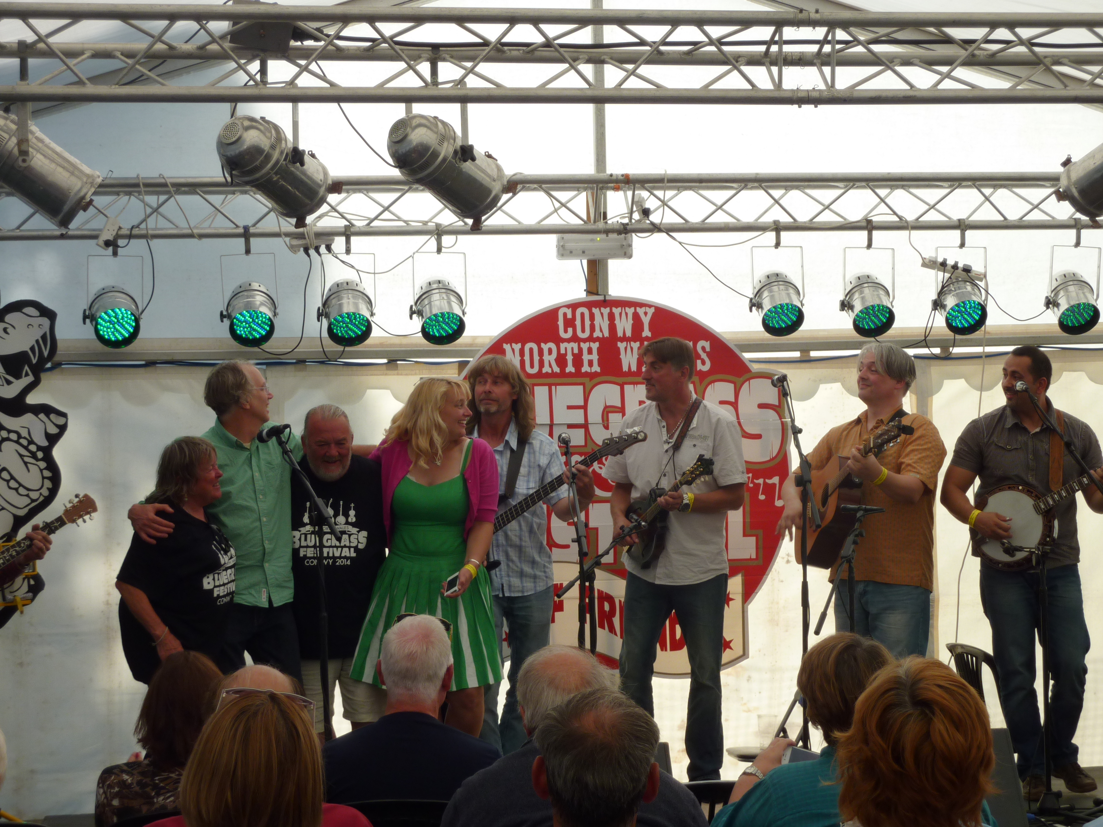 Nová Sekce za závěrečném koncertu festivalu North Wales Bluegrass Festival Conwy 2014